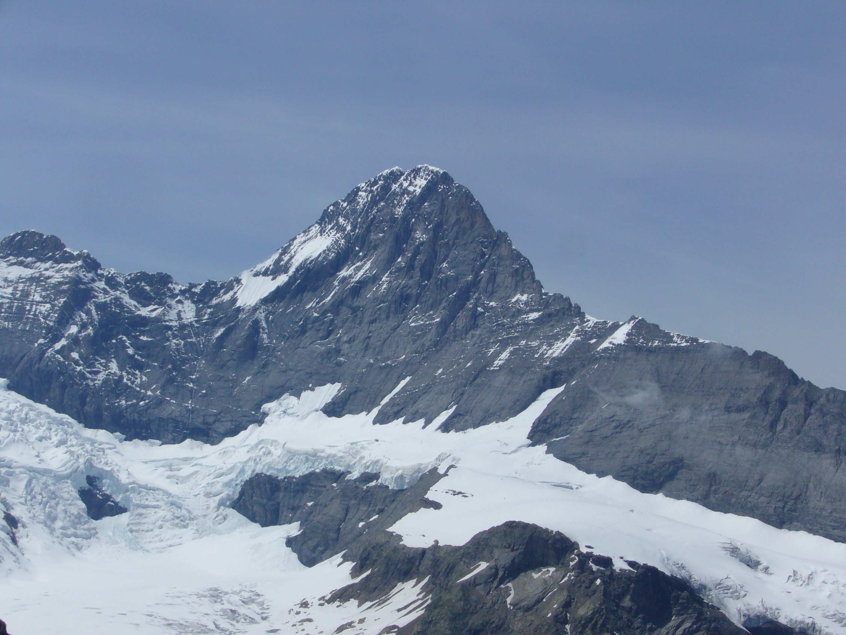 Eiger Südwand